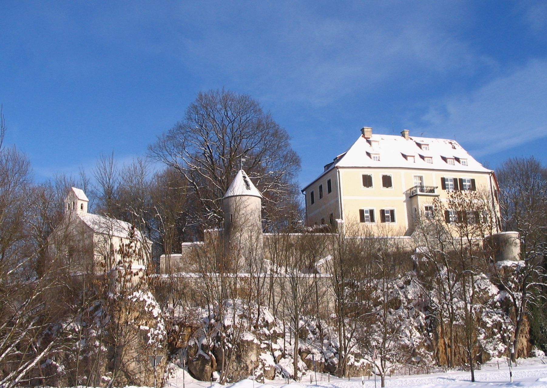 Schloss Wackerstein, Markt Pförring, Landkreis Eichstätt, Oberbayern